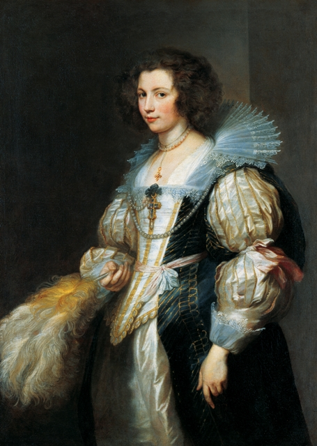 Portrait of Marie-Louise Tassis